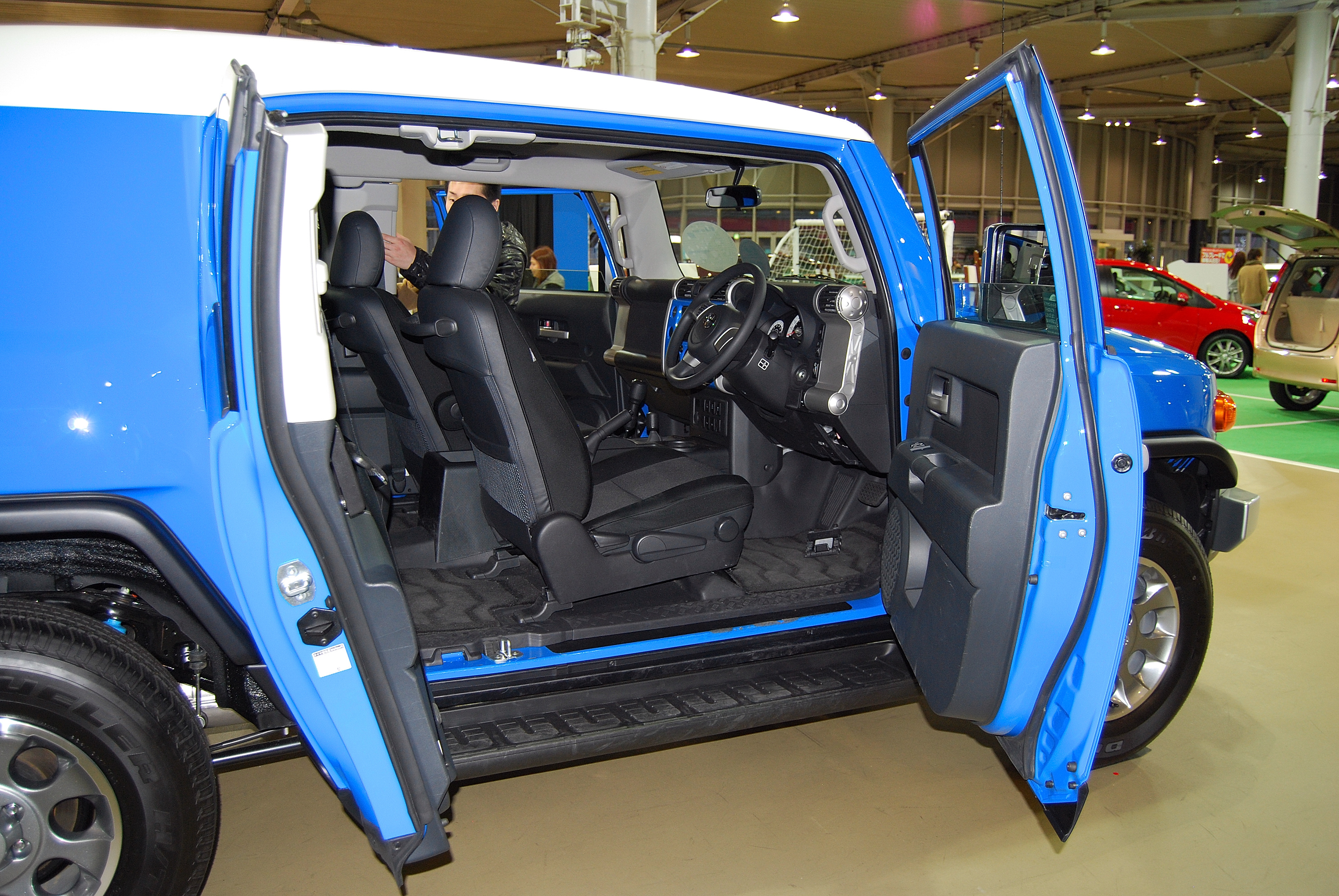 トヨタFJクルーザーの観音開きの扉